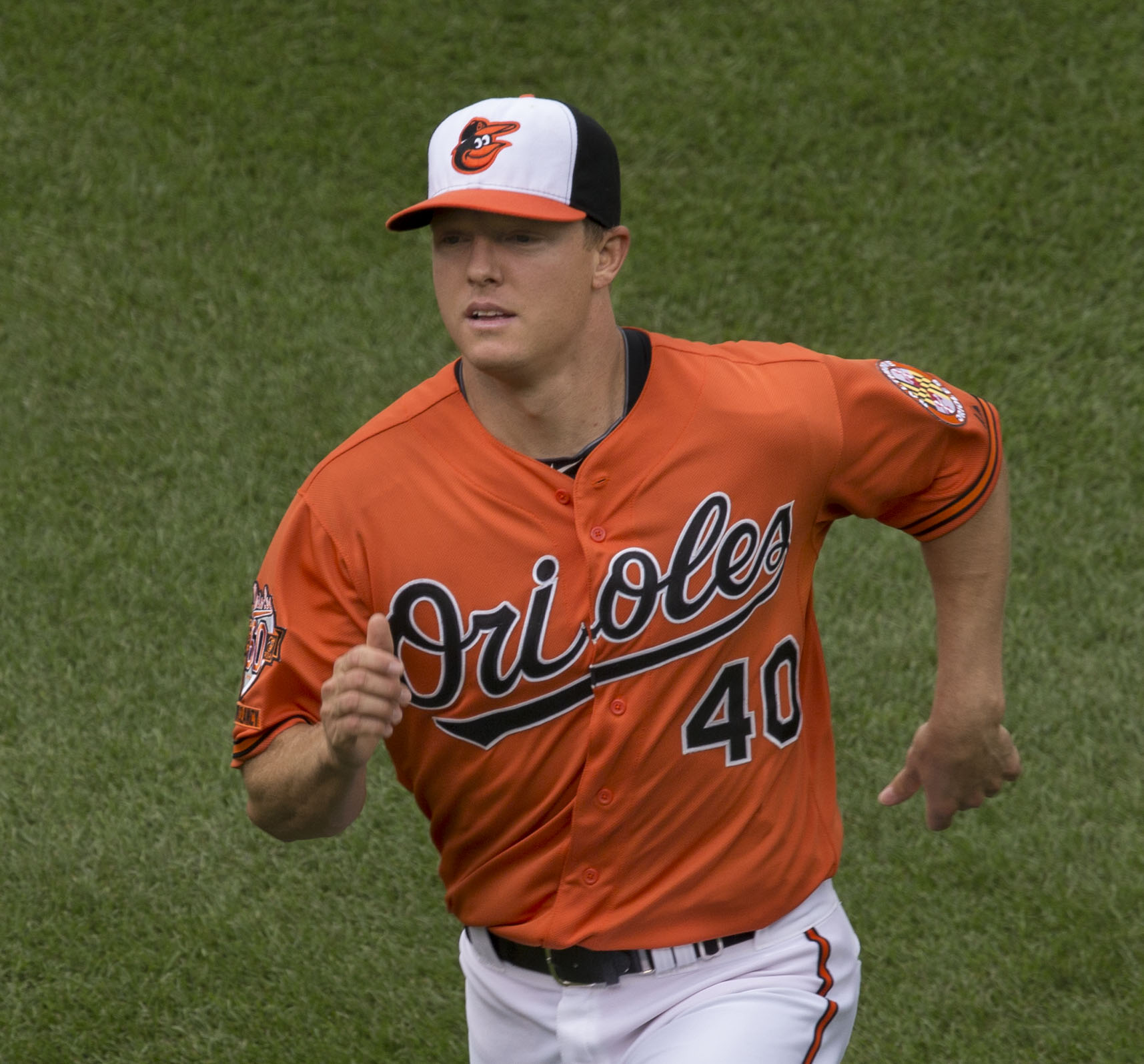 Nick Hundley